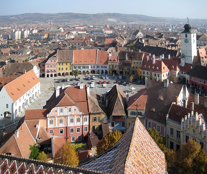 Sibiu/Hermannstadt, Blick vom Turm der Stadtpfarrkirche auf den Kleinen Ring